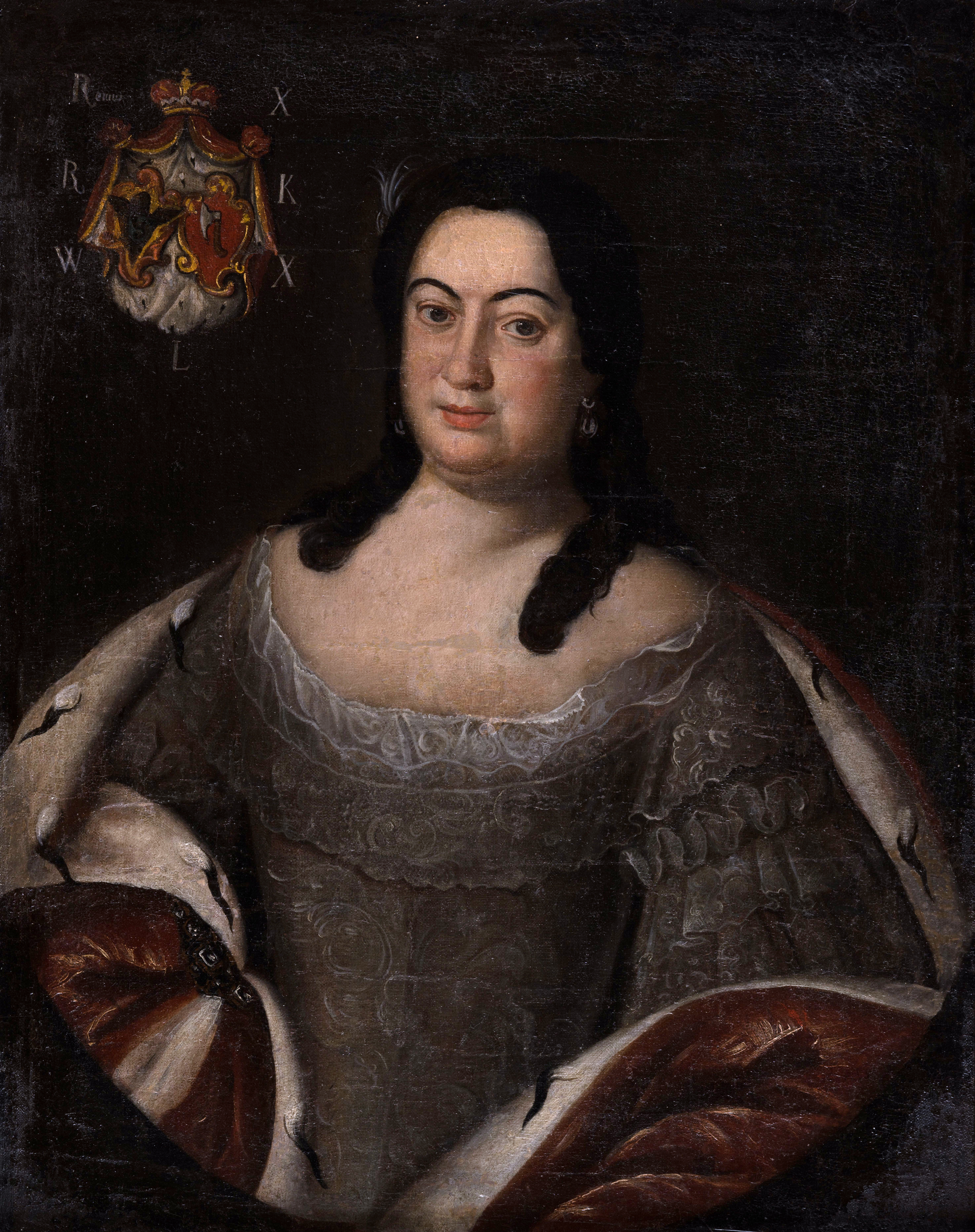 Беларуская (тарашкевіца): Партрэт Соф’і Радзівіл (Sofja Radzivił) з Рэяў (Rej)